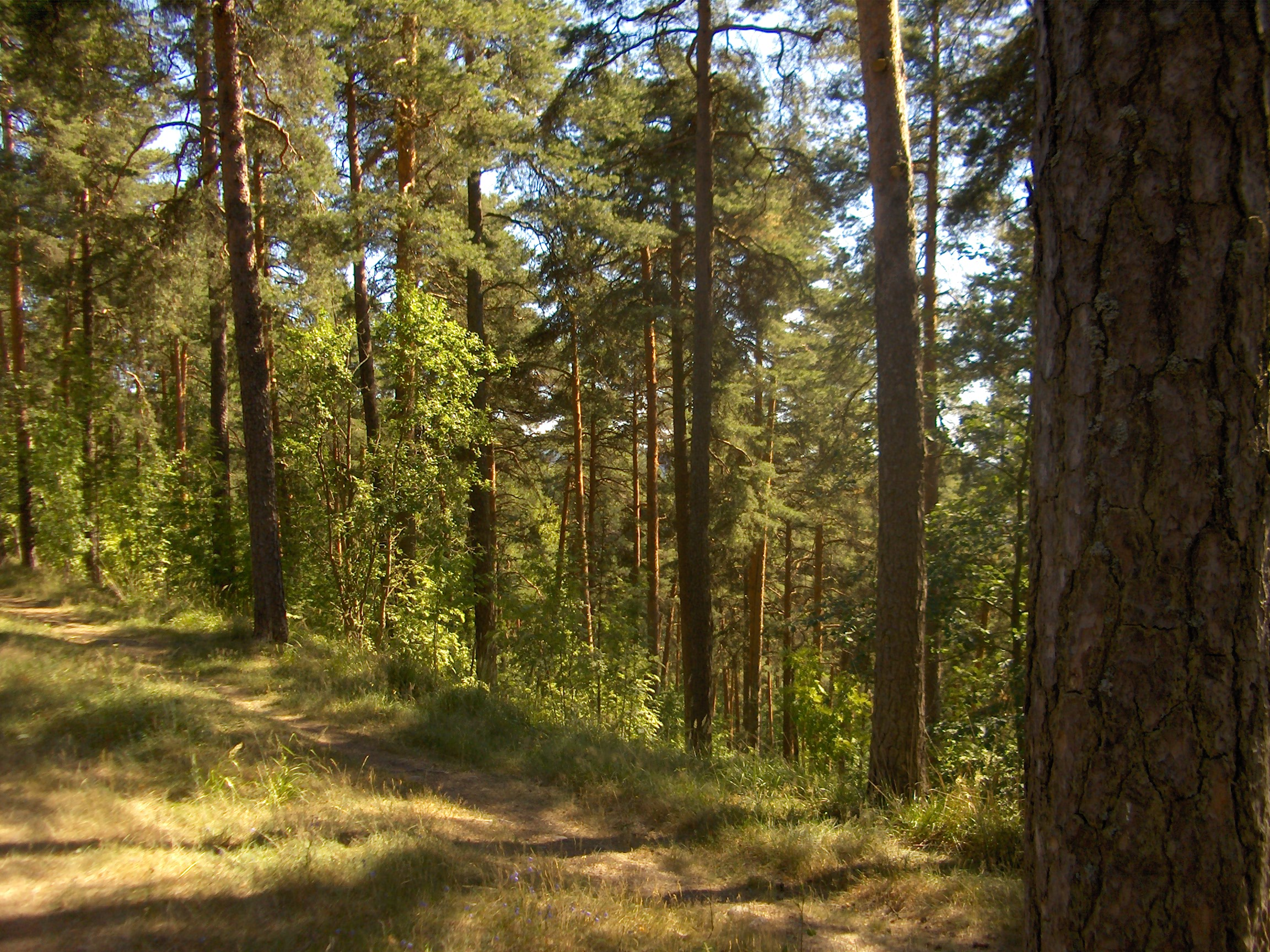 Pyynikki ridge in Tampere